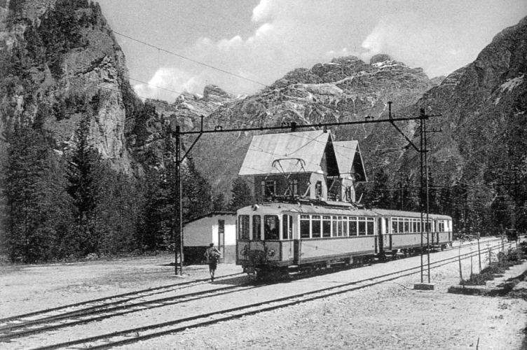 autore: ignoto provenienza: - grazie a Mauro Bottegal descrizione: Treno delle Dolomiti presso carbonin data: ignota, ma precedente il 1964 Licenza d'uso: Pubblico dominio